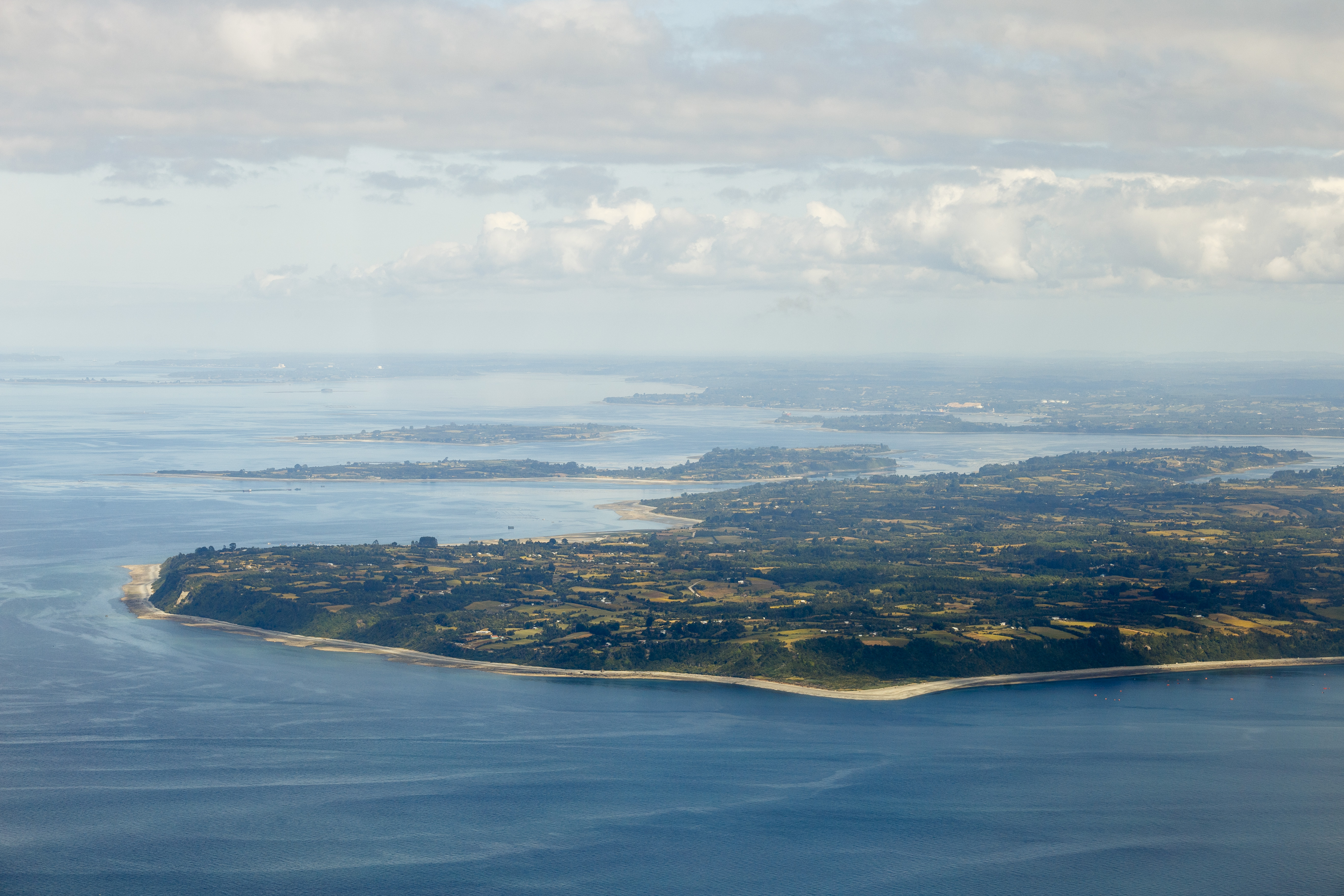 Islas Puluqui, Chidguapi y Quenu, archipiélago de Calbuco, Región de Los Lagos.